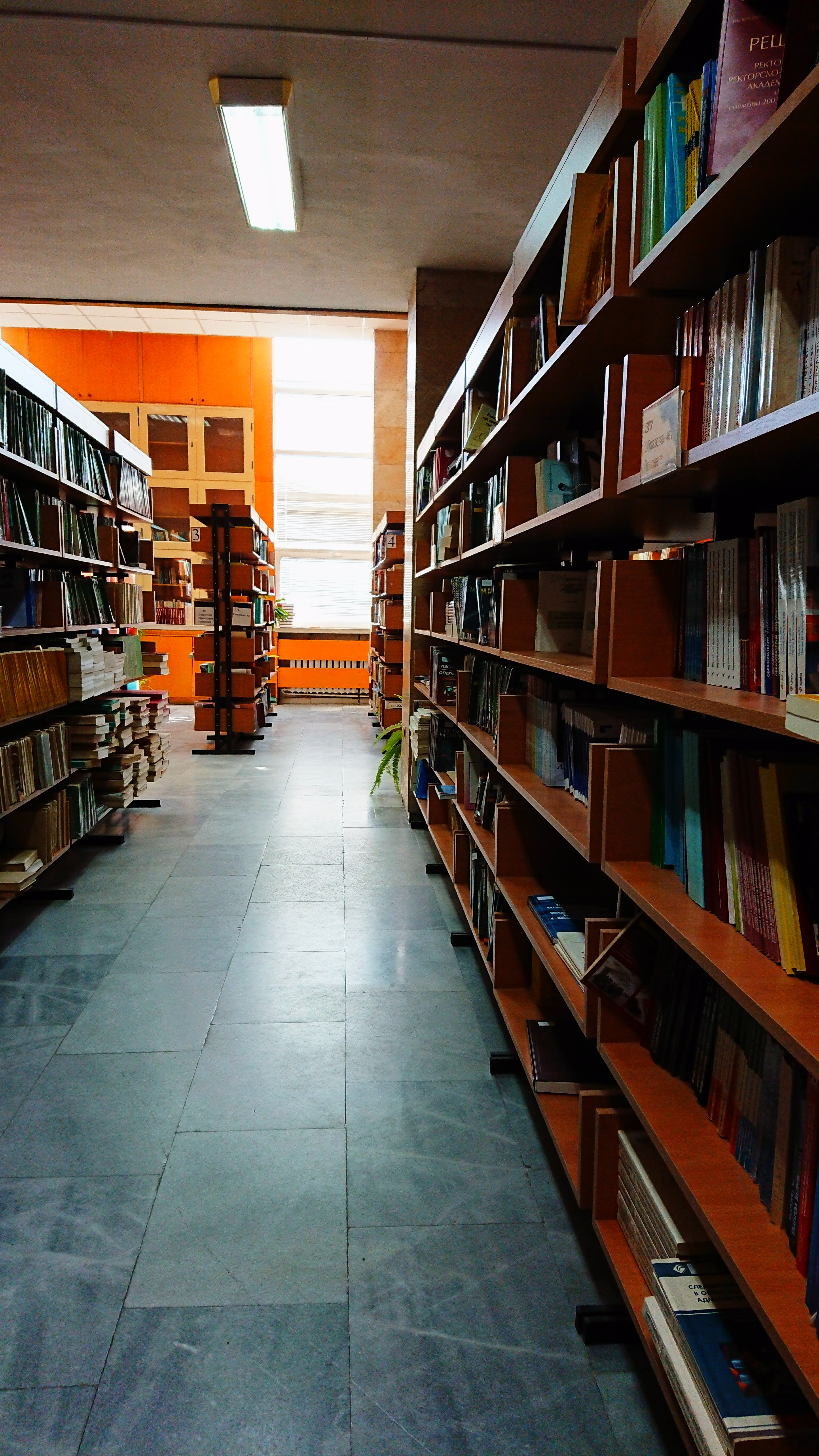 В библиотеката на УНСС